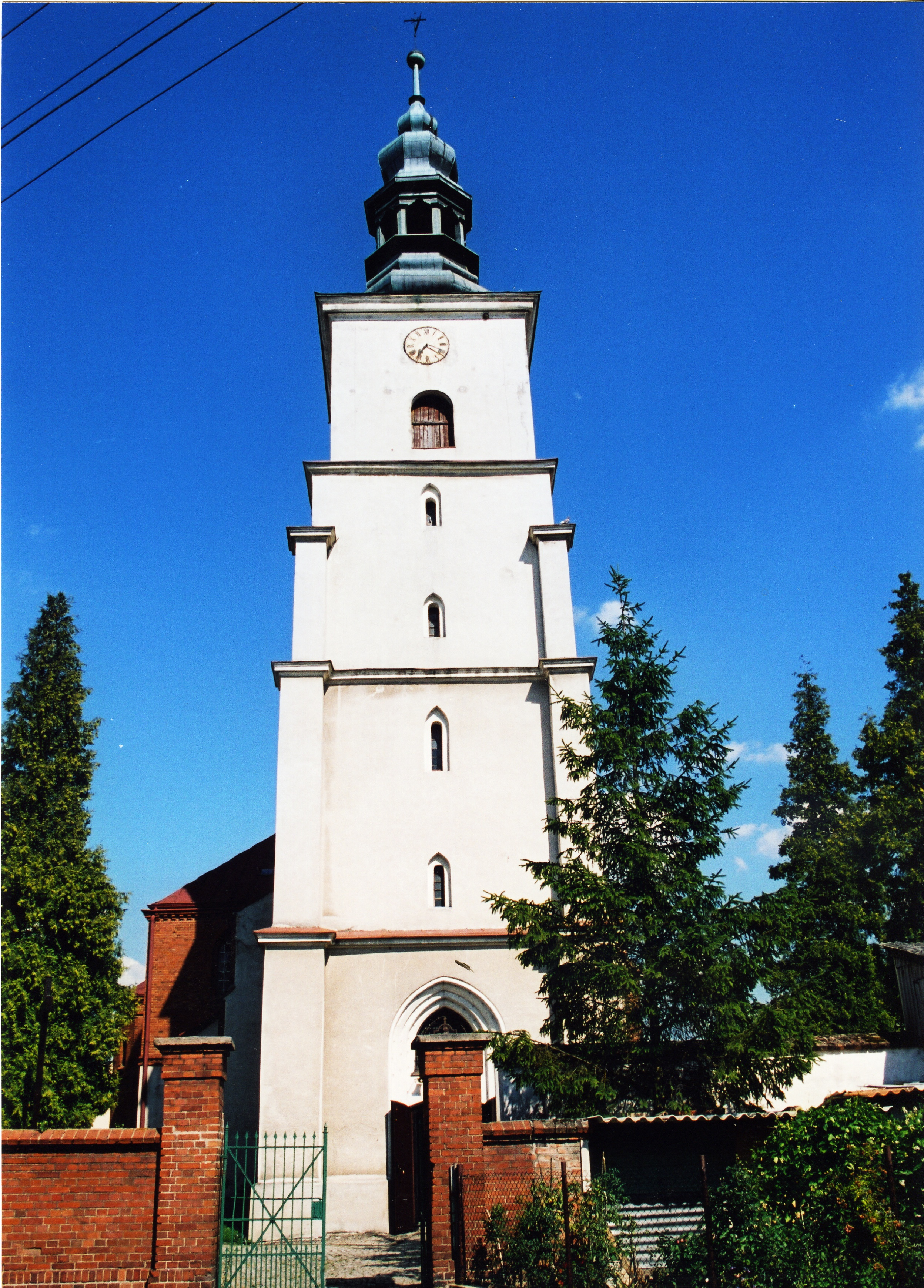 Owczary - rzymskokatolicki kościół parafialny p.w. św. Marcina, 2 poł. XV, 2 poł. XIX w